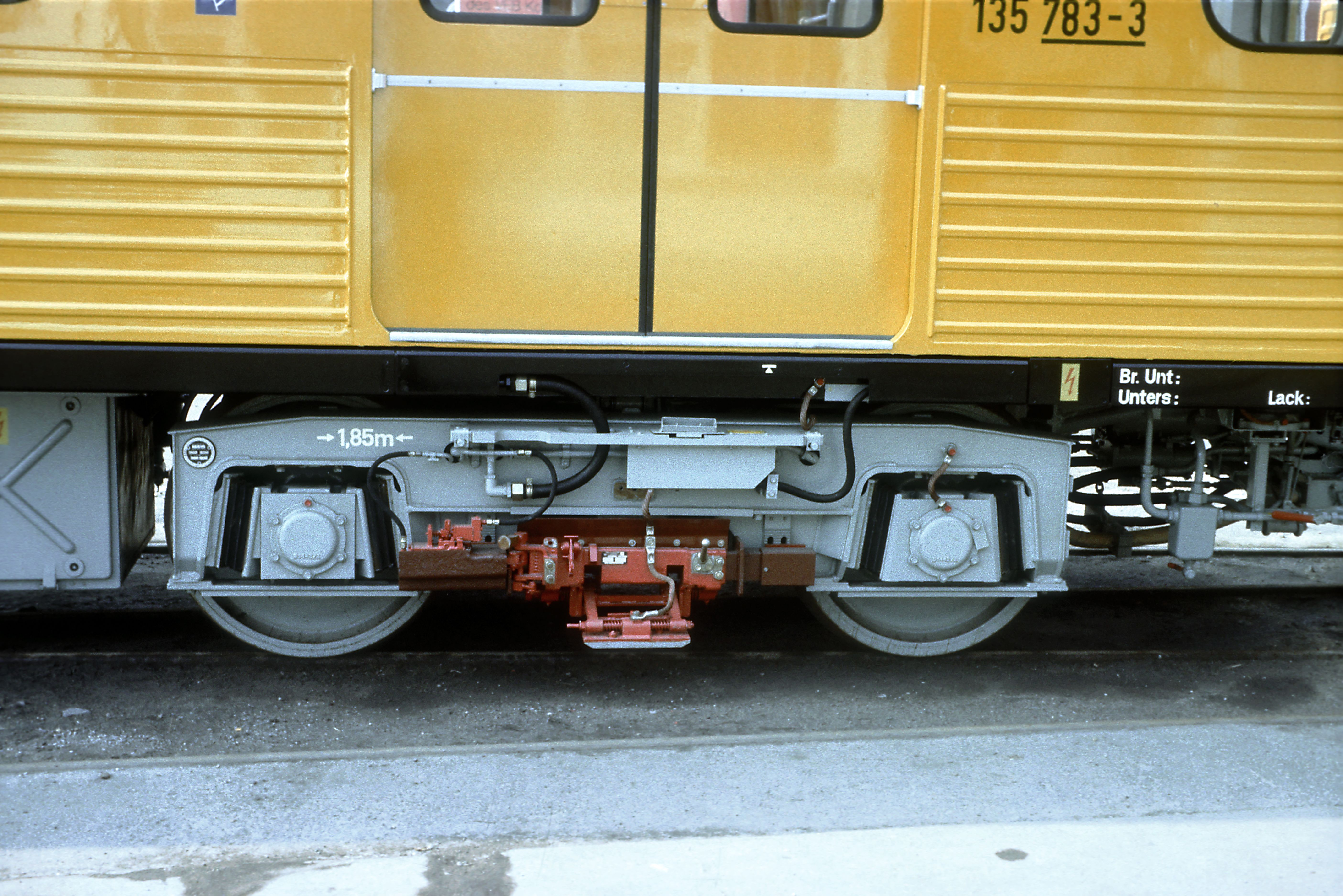 Drehgestell mit Stromabnehmer, 1979 grau lackiert